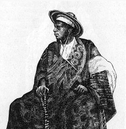 Un marabout sénégalais (illustration de Côte occidentale d'Afrique, du Colonel Frey, Fig.86 p. 135)